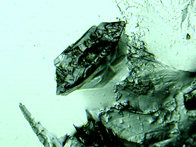 Krystalizace azidu sodného z vody